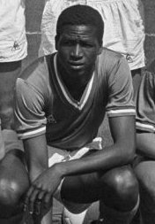 Saif Keita avec l'AS Saint-Etienne en 1968.